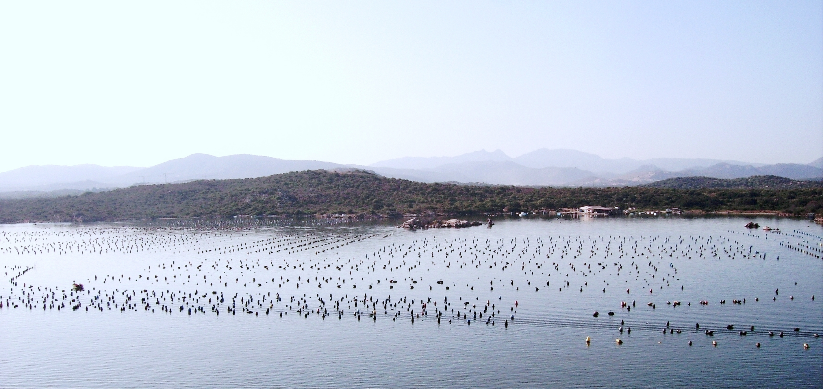 Golfo di Olbia, stabulari.